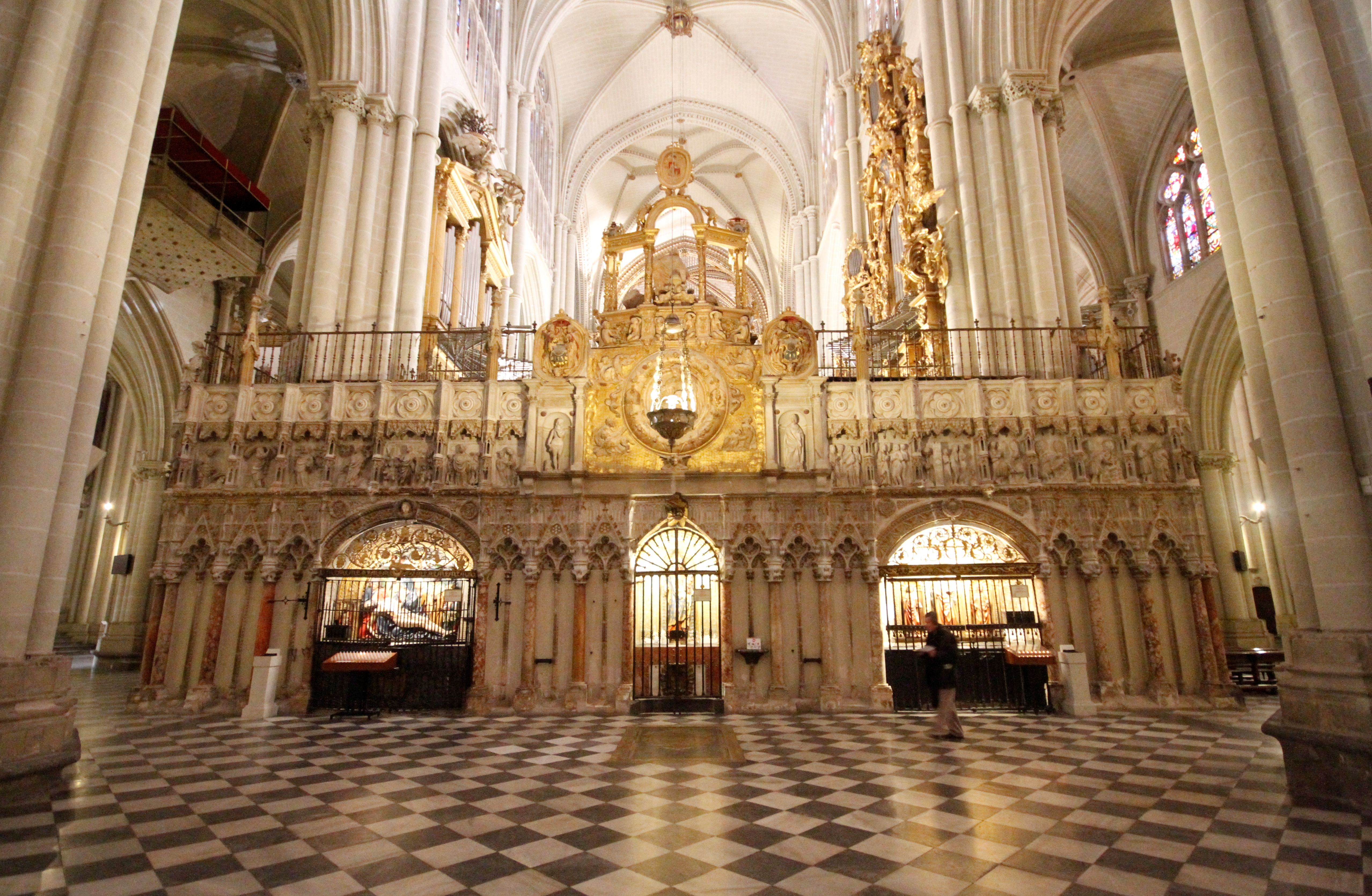 Parte de trás do coro